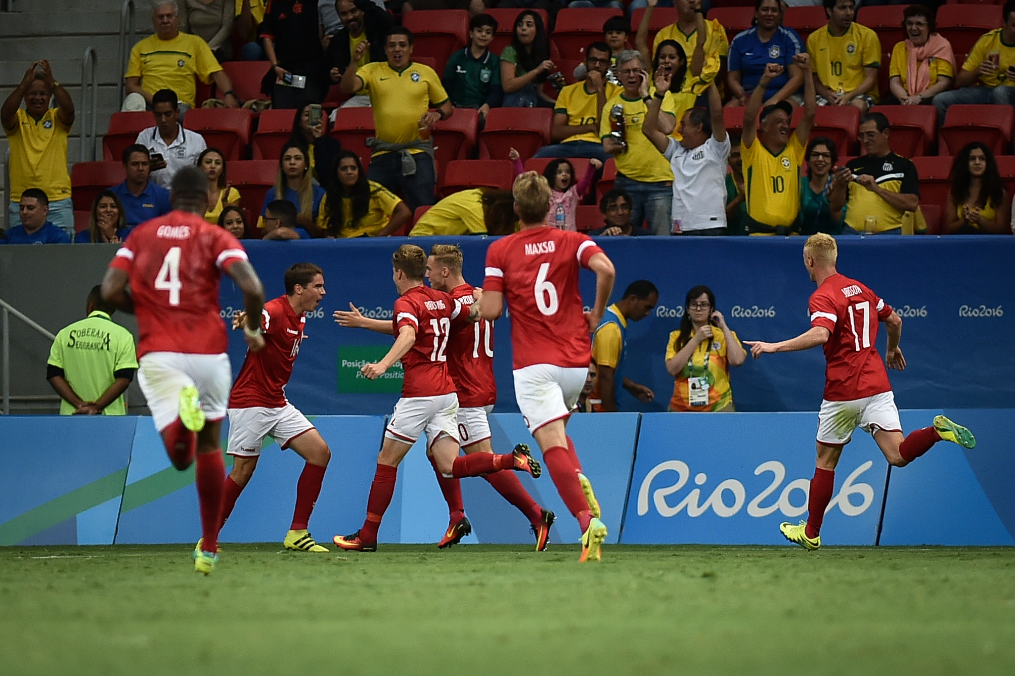 Estádio Nacional de Brasília Mané Garrincha, Brasília, DF, Brasil, 7/8/2016 Foto: Andre Borges/Agência Brasília. Dinamarca e África do Sul jogam neste domingo (7), no Estádio Mané Garrincha, pelo grupo A do futebol masculino nas Olimpíadas 2016. A Dinamarca venceu a África do Sul por 1x0, com gol de Robert Skov no segundo tempo.